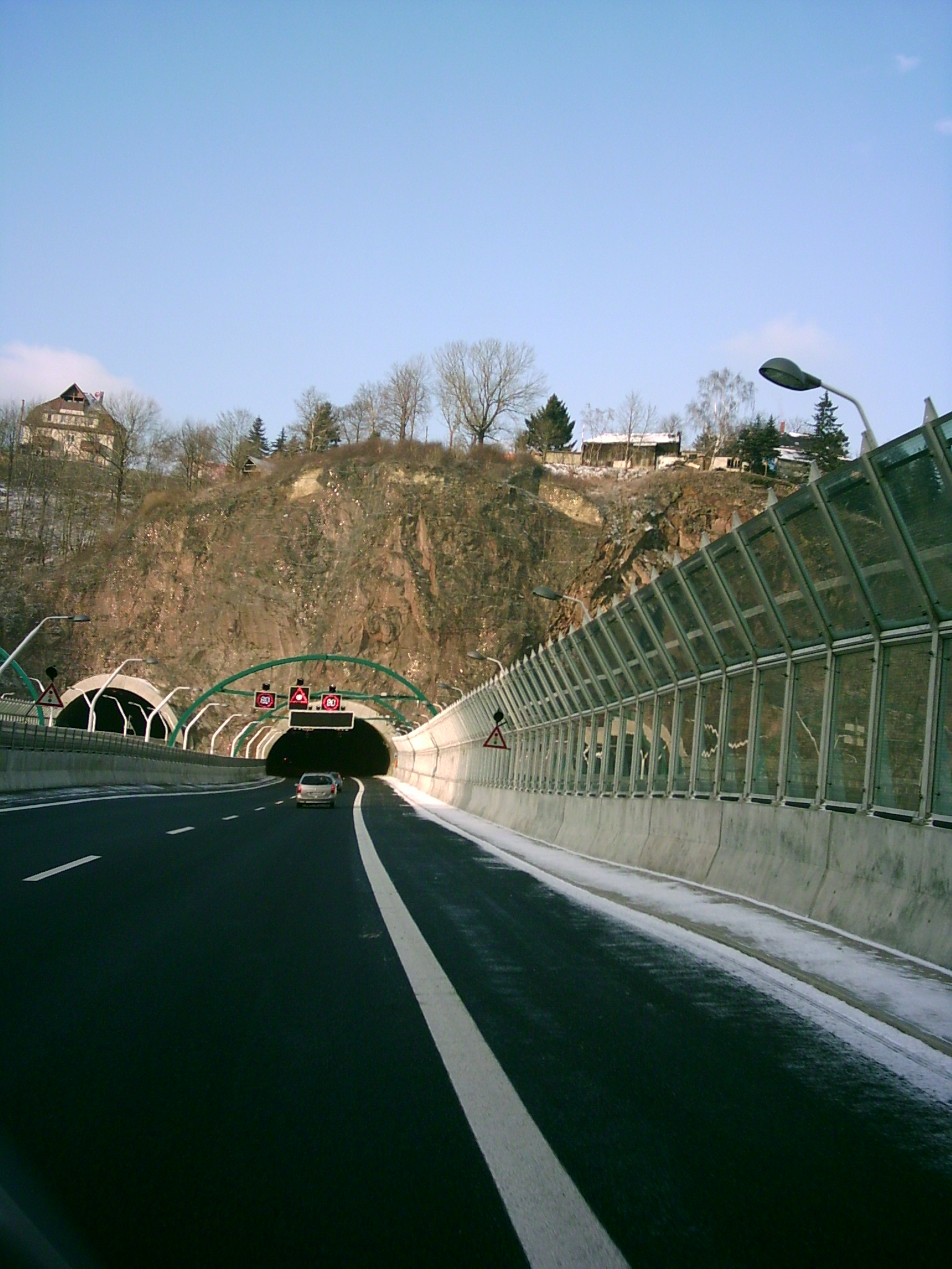 Tunnel Dölzschen der Bundesautobahn 17